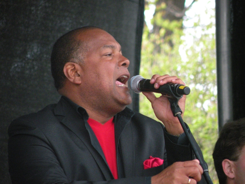 Дэйв Бентон в Таллинне, День Европы